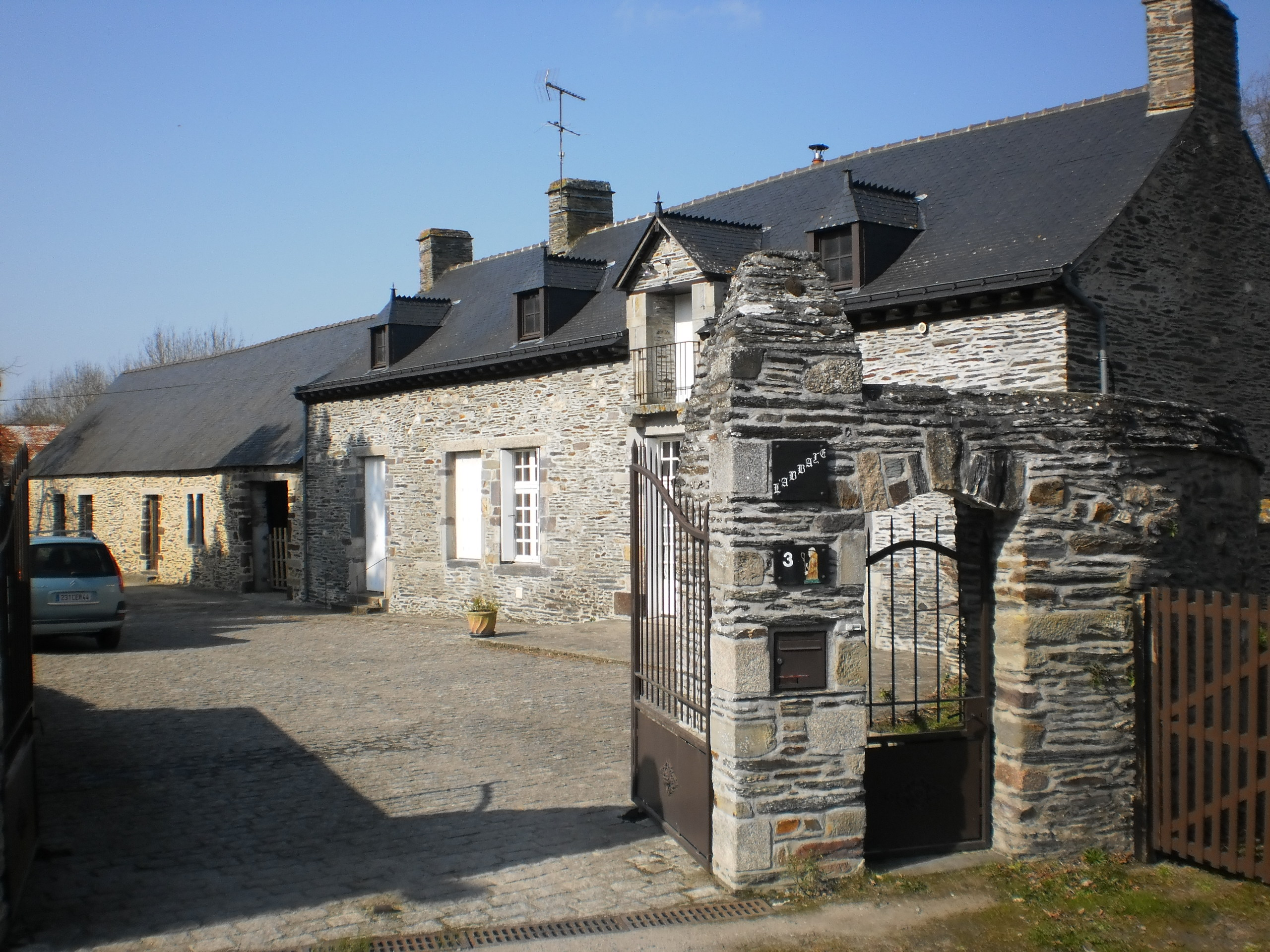 Massérac (Loire-Atlantique, France) - abbaye